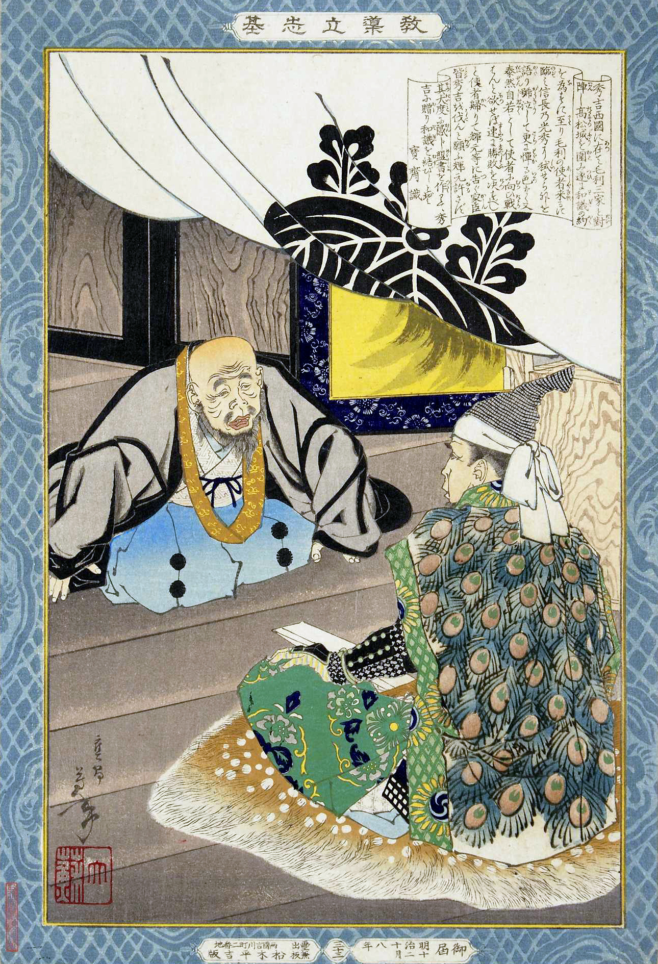 “秀吉西國に在て毛利三家と對陣（対陣）し高松城を圍（囲）み遂に和議の約を為すに至り毛利の使者来るに臨ミ信長乃光秀に弑せられしを語り號泣（号泣）して更に憚る色なく又泰然自若として使者に向ひ戰（戦）わんと欲せば速に勝敗を決すべしと 使者歸（帰）りて輝元等に告ぐ 家臣皆秀吉を伐んと願ふ 輝元許さず其大度に感じ盟書を作りて秀吉に贈り和議を結びしとぞ 宝斎 識”